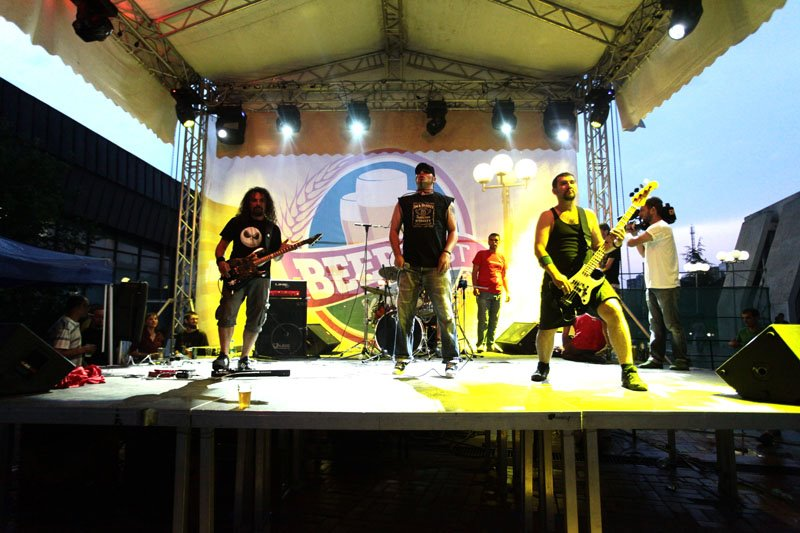 Performanca e grupit Troja në Beer Fest Kosova 2